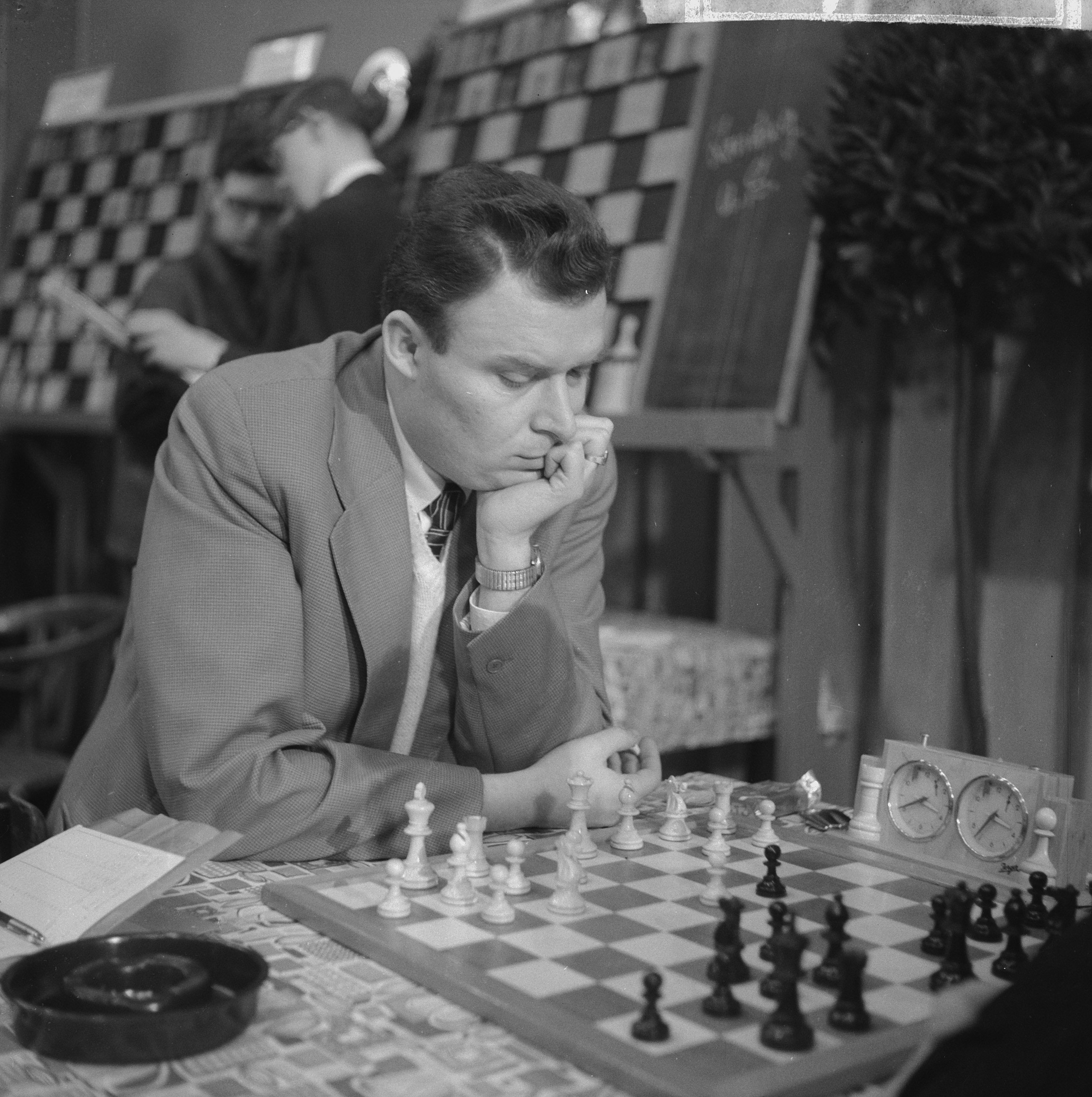 Collectie / Archief : Fotocollectie Anefo Reportage / Serie : [ onbekend ] Beschrijving : 26e Hoogovenschaaktoernooi te Beverwijk, Dr. M. Flip (Tsjechoslowakije) Datum : 8 januari 1964 Locatie : Beverwijk, Tsjecho-Slowakije Trefwoorden : schaken Persoonsnaam : Dr. M. Flip Instellingsnaam : Hoogovenschaaktournooi Fotograaf : Nijs, Jac. de / Anefo Auteursrechthebbende : Nationaal Archief Materiaalsoort : Negatief (zwart/wit) Nummer archiefinventaris : bekijk toegang 2.24.01.03 Bestanddeelnummer : 915-9241